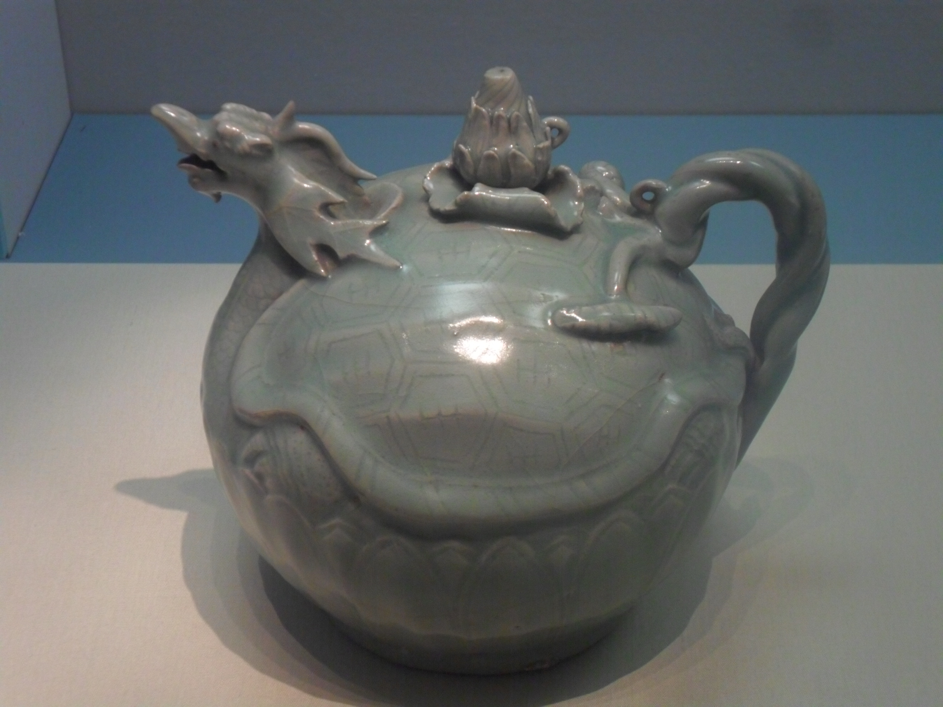 Ấm men lam hình rùa đầu rồng thời Cao Ly tại Bảo tàng Quốc gia Hàn Quốc